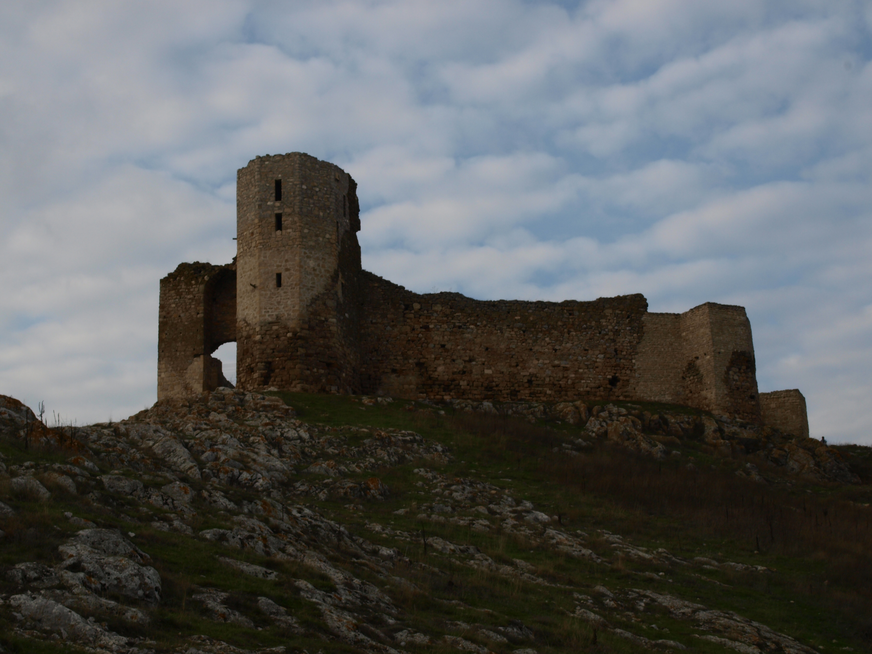 Situl arheologic de la Enisala, punct "Palanca"